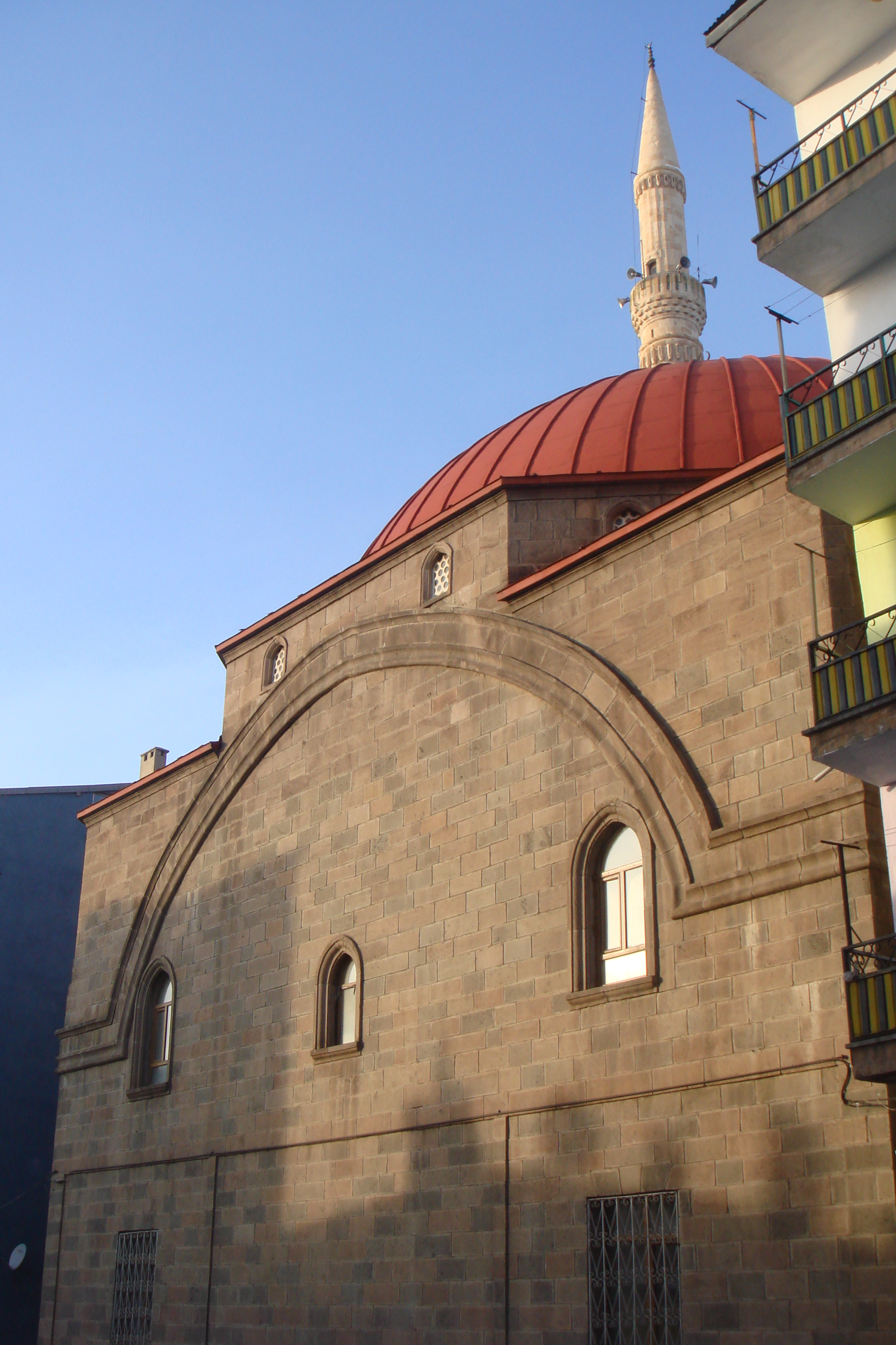 Турция, ил Карс, город Сарыкамыш, большая мечеть